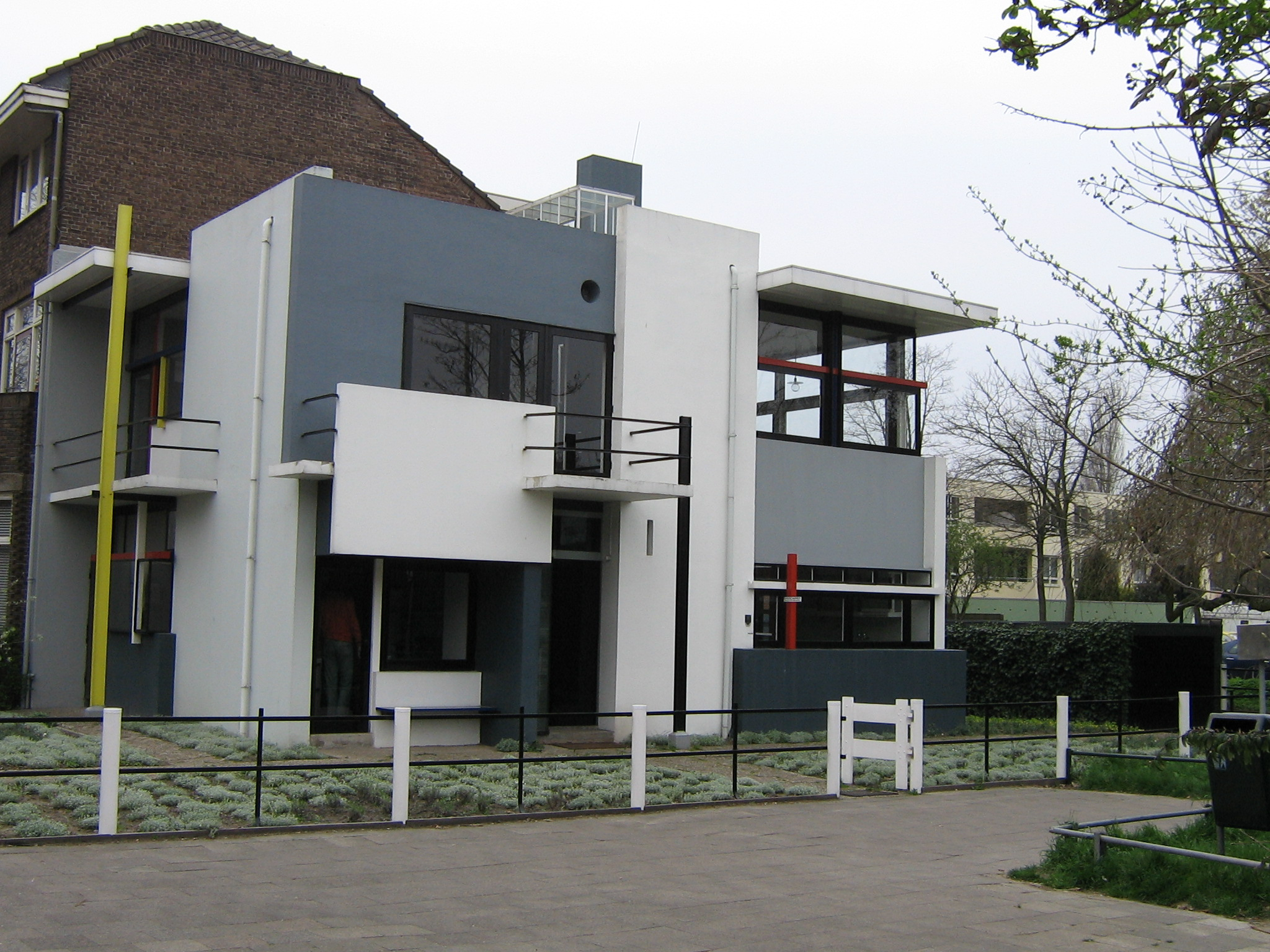 Utrecht: Rietveld-Schröderhuis Utrecht-Netherlands: House designed by Gerrit Rietveld.